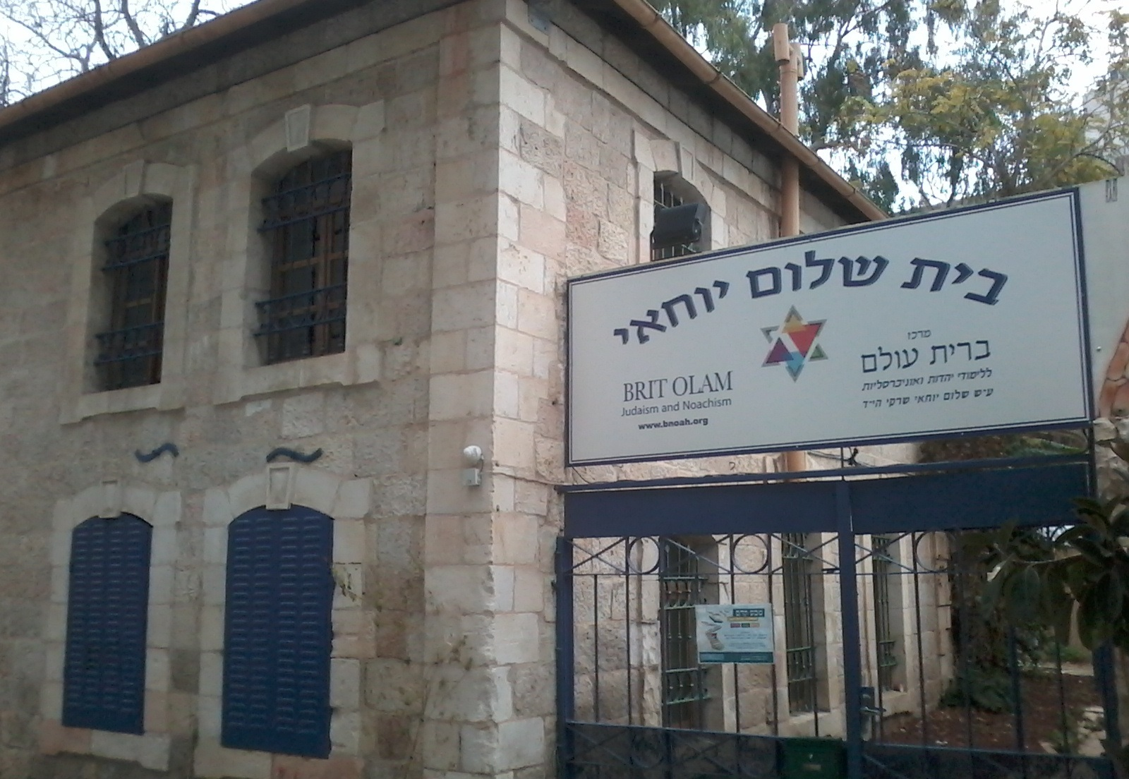 "בית שלום יוחאי" - על שם שלום יוחאי שרקי הי"ד. ירושלים 2018